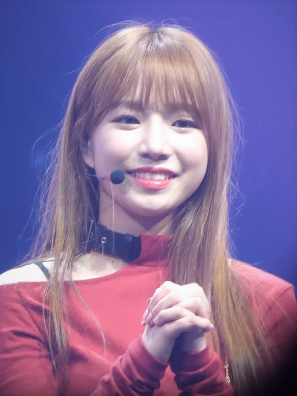 아이즈원 (IZ*ONE) '멤버별 데뷔소감' 직캠 Fancam @IZ*ONE SHOW-CON